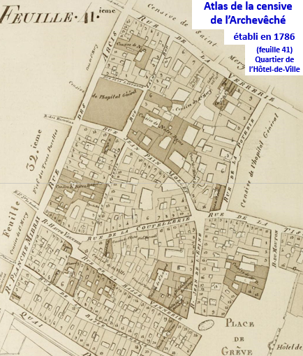 Censives en 1786 dans le quartier de l'Hôtel-de-Ville